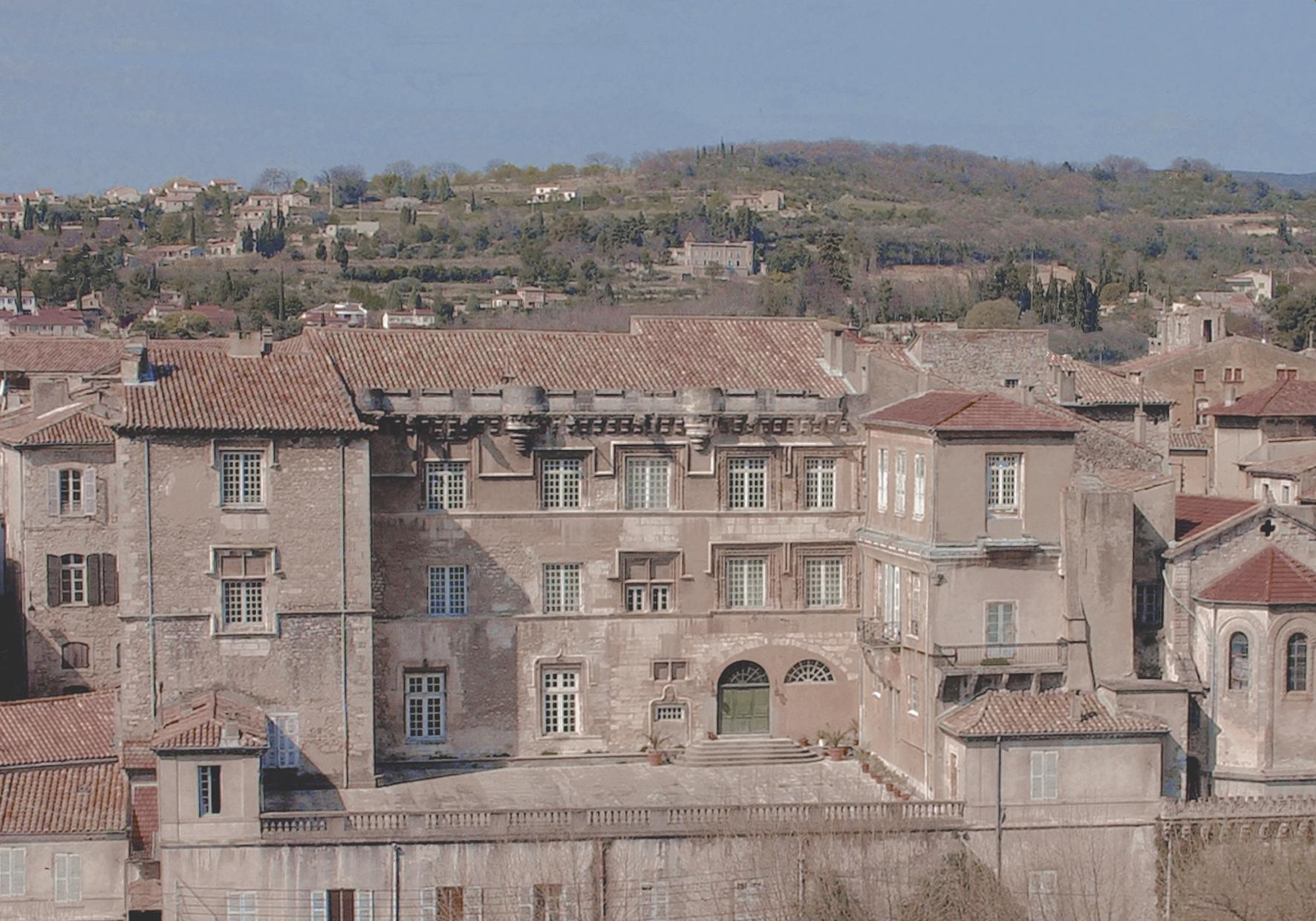 Façade du Palais des Evêques et du Musée Margotton de Bourg-Saint-Andéol (Ardèche : France)